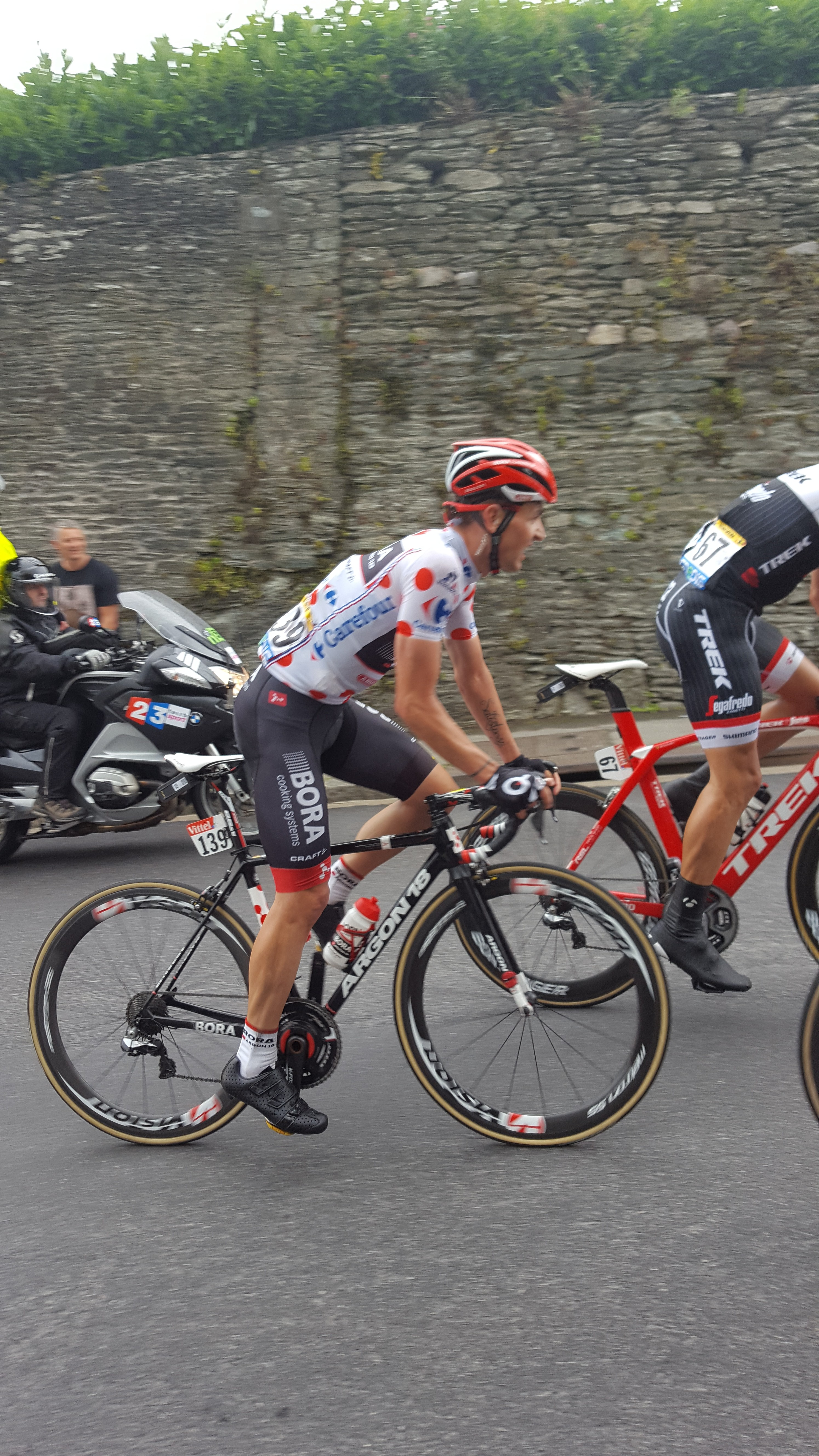 Passage du maillot à pois Paul Voss, échappé dans la côte d'Octeville (chemin des Aiguillons) durant la 2e étape du Tour de France 2016.